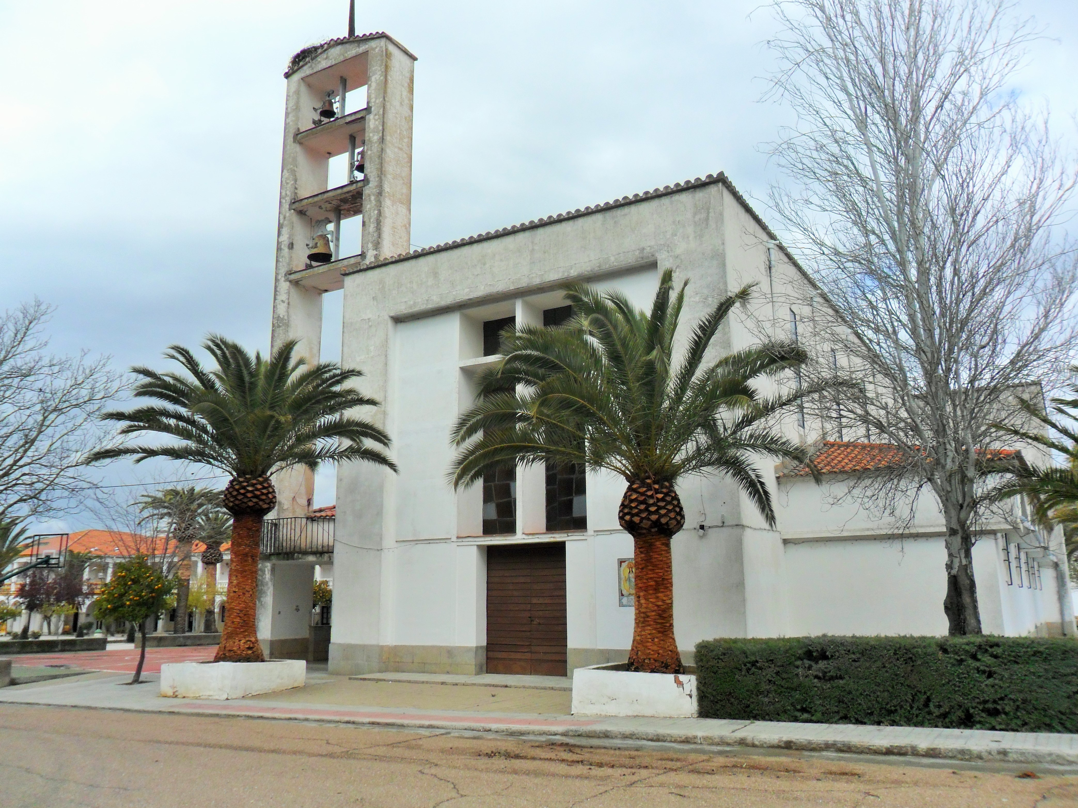 Iglesia parroquial de san Bartolomé Apóstol